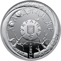 Ювілейна монета "Холодний Яр". Аверс